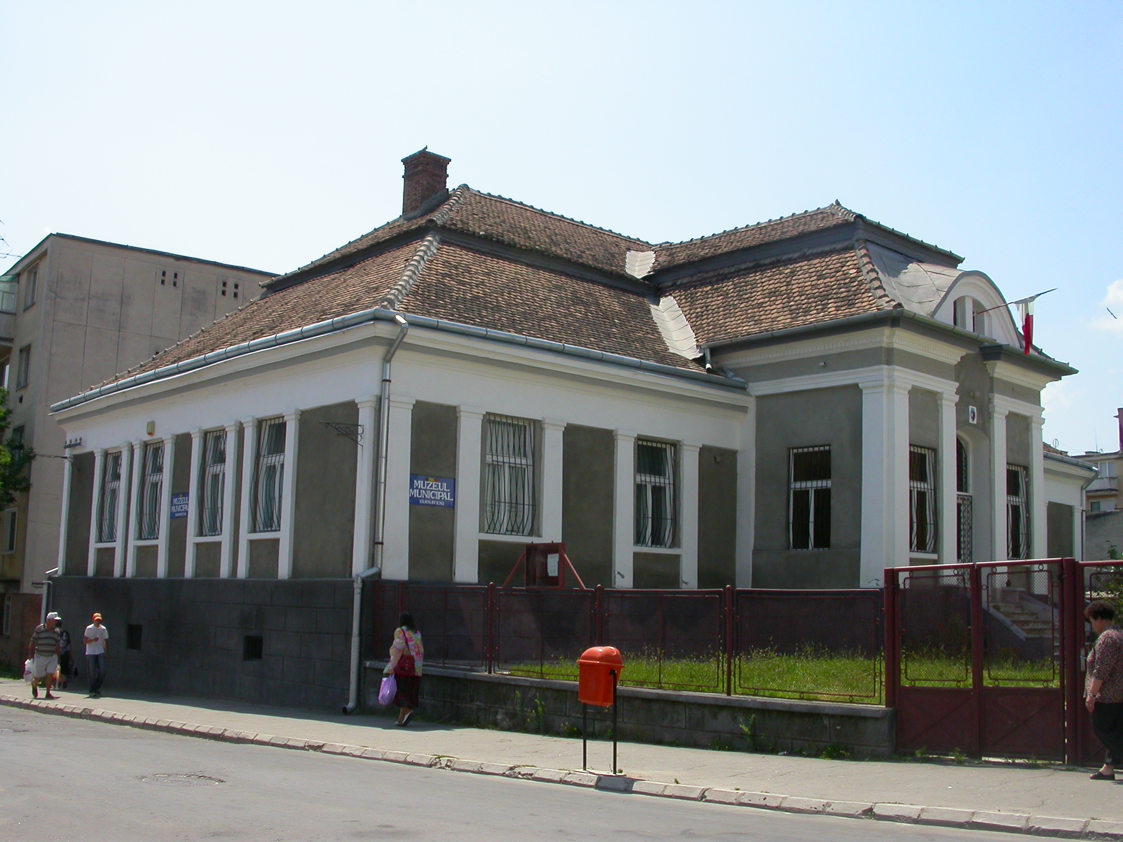 Casa Beldy, 1860